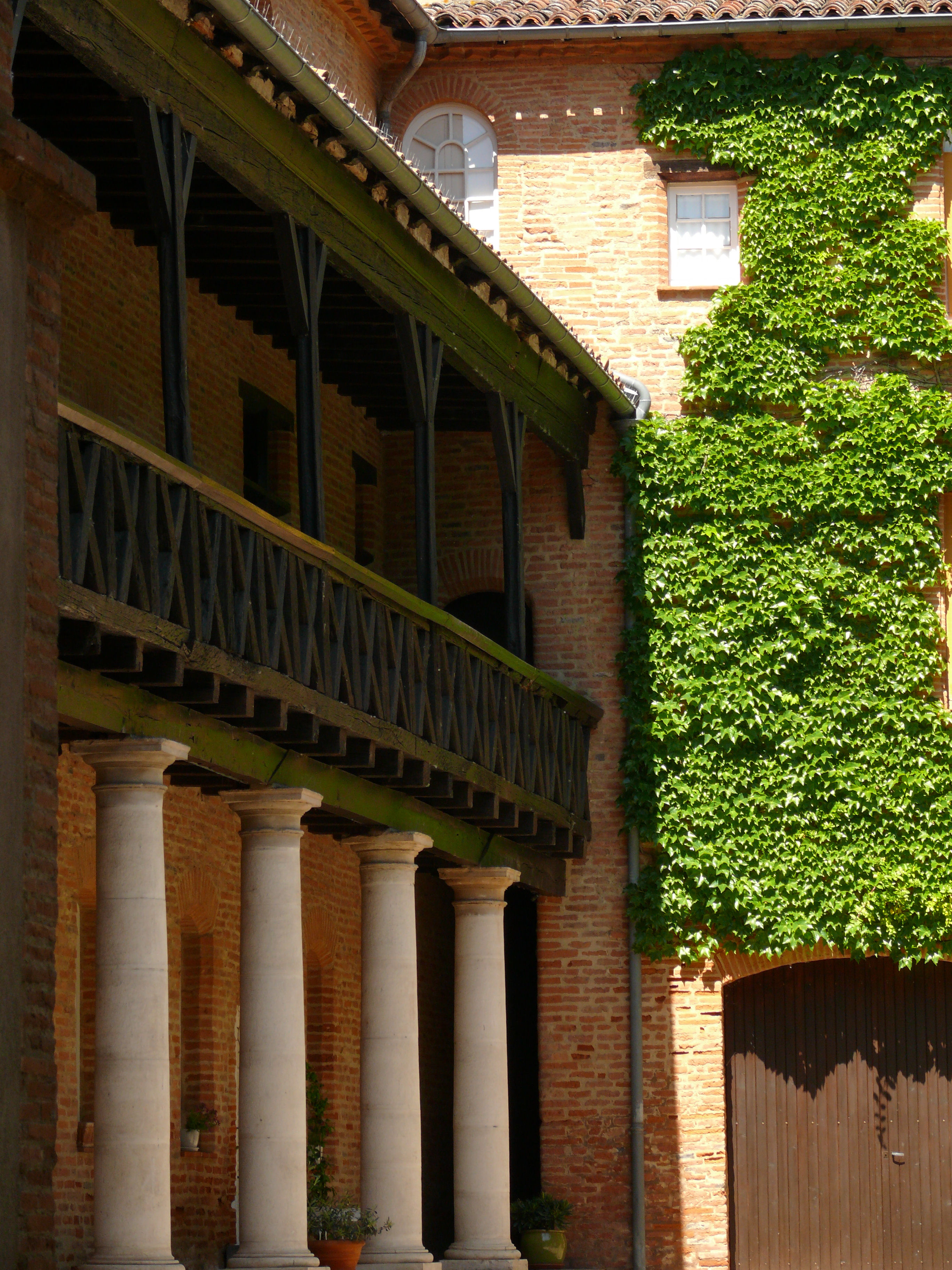 Montauban - Immeuble, 12 rue Armand-Cambon - Galerie de l'ancien collège de Navarre construit vers 1597